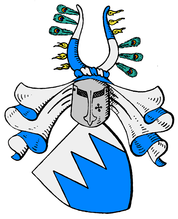 Wappen der Marschalck von Bachtenbrock